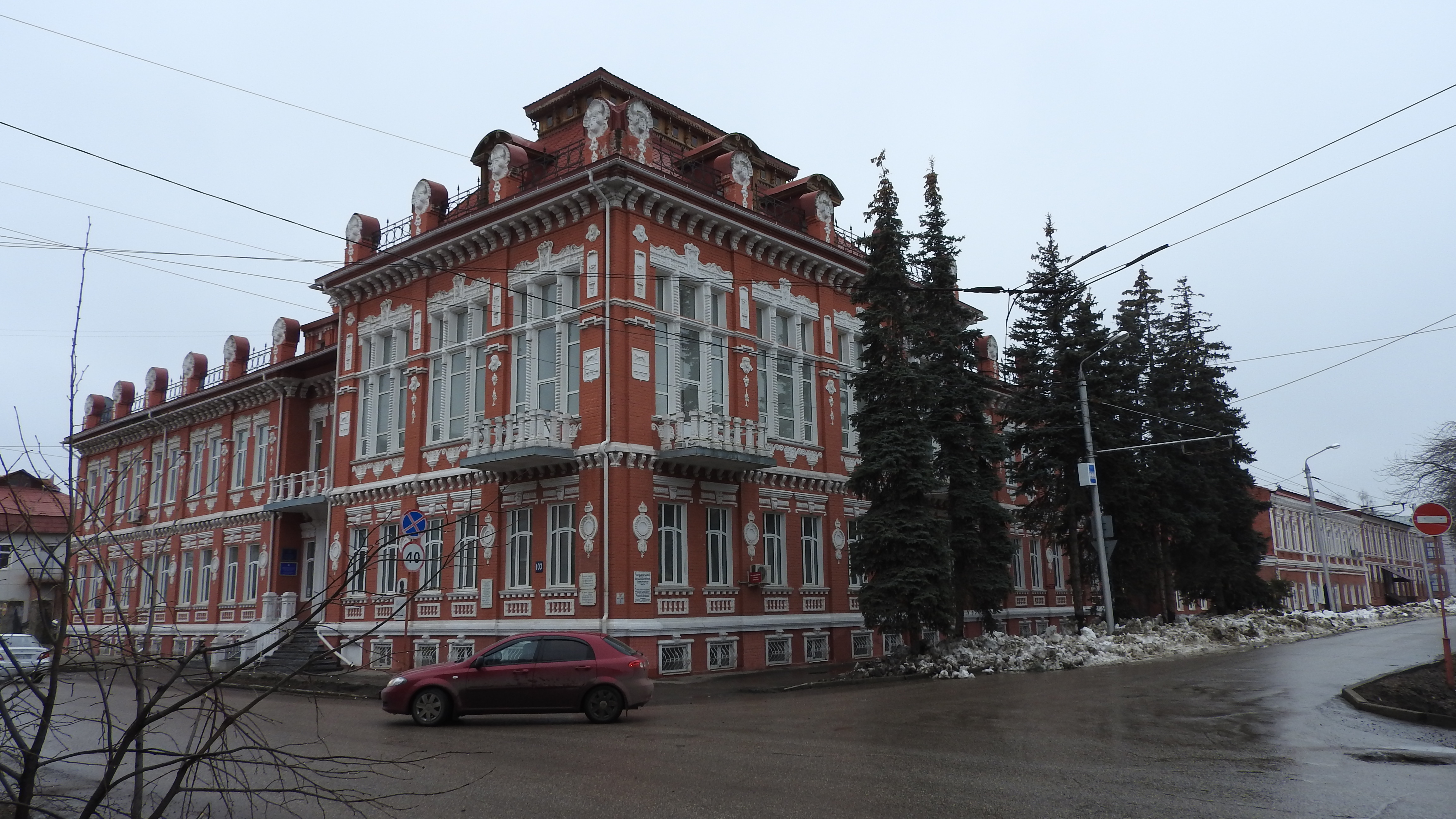 Сквер в Стерлитамаке